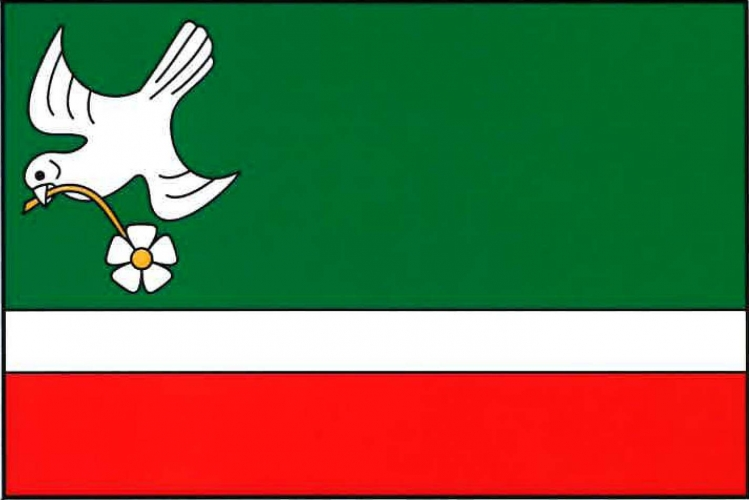 vlajka,Kolešov , okres Rakovník